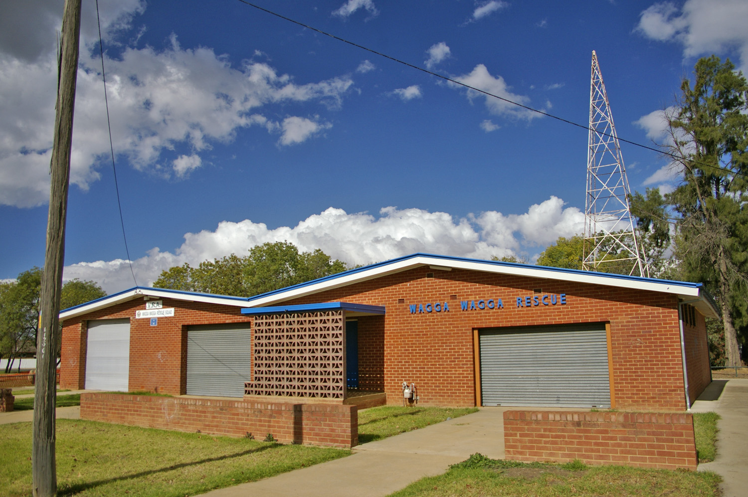 Wagga Wagga Rescue Squad